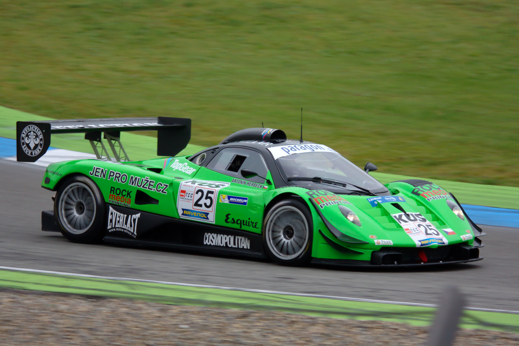 Antonin Herbeck fährt einen Pagani Zonda C12 GR beim Rheintalrennen der DMV Touring Car Challenge 2014